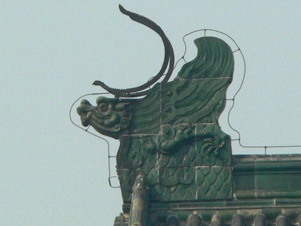 望兽,摄于北京钟楼